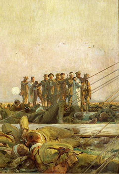 John Singer Sargent (1856–1925) DescriptionAmerican painterDate of birth/death 12 January 1856 15 April 1925Location of birth/death Florence LondonWork location Paris, Netherlands, United Kingdom, United States of America, ItalyAuthority control : Q155626 VIAF: 12466780 ISNI: 0000 0001 0870 9581 ULAN: 500023972 LCCN: n50019335 NAID: 10582208 WorldCat creator QS:P170,Q155626 - Gassed (фрагмент картини праворуч)